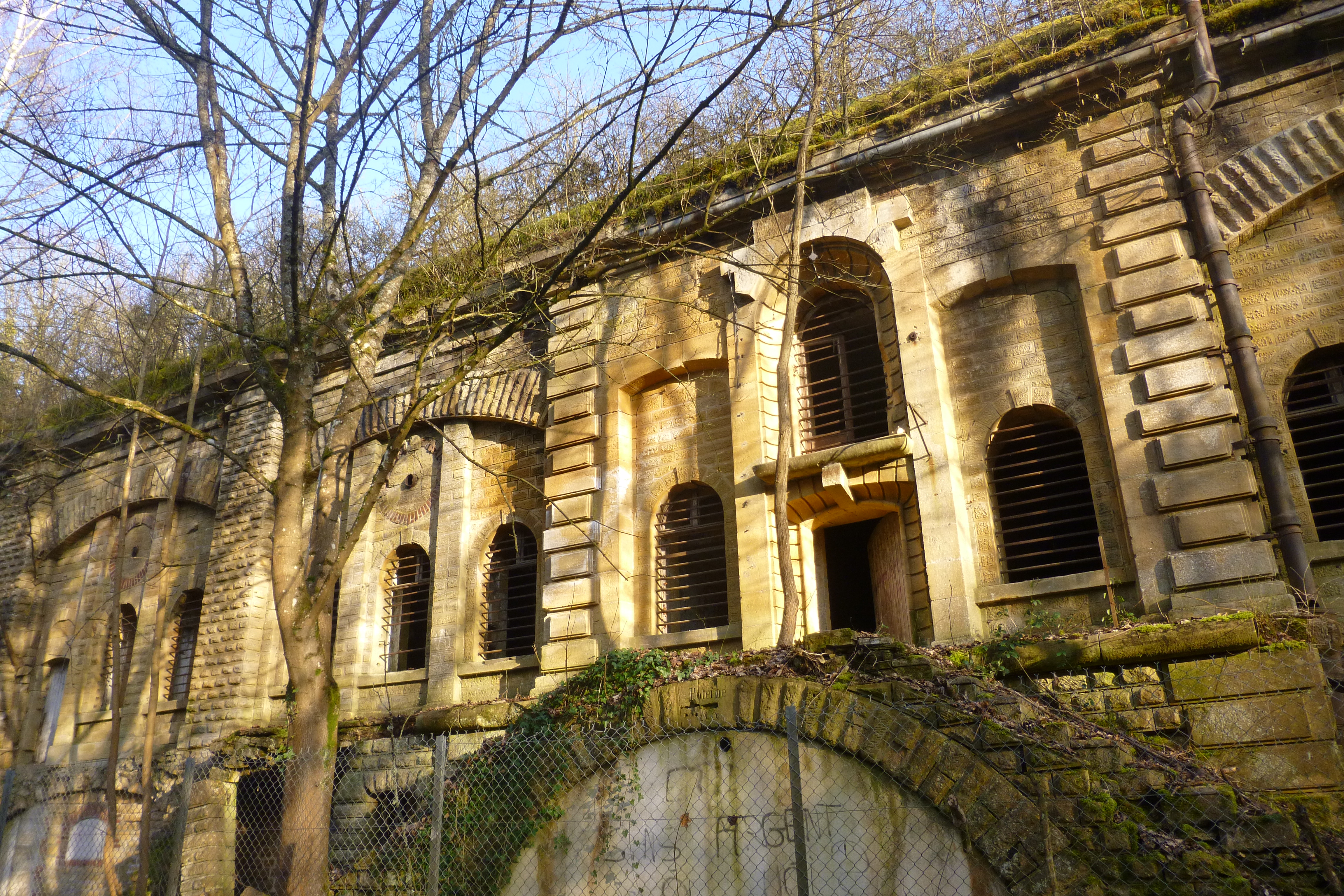 Bâtiment interne du fort de Queuleu à Metz (Lorraine).